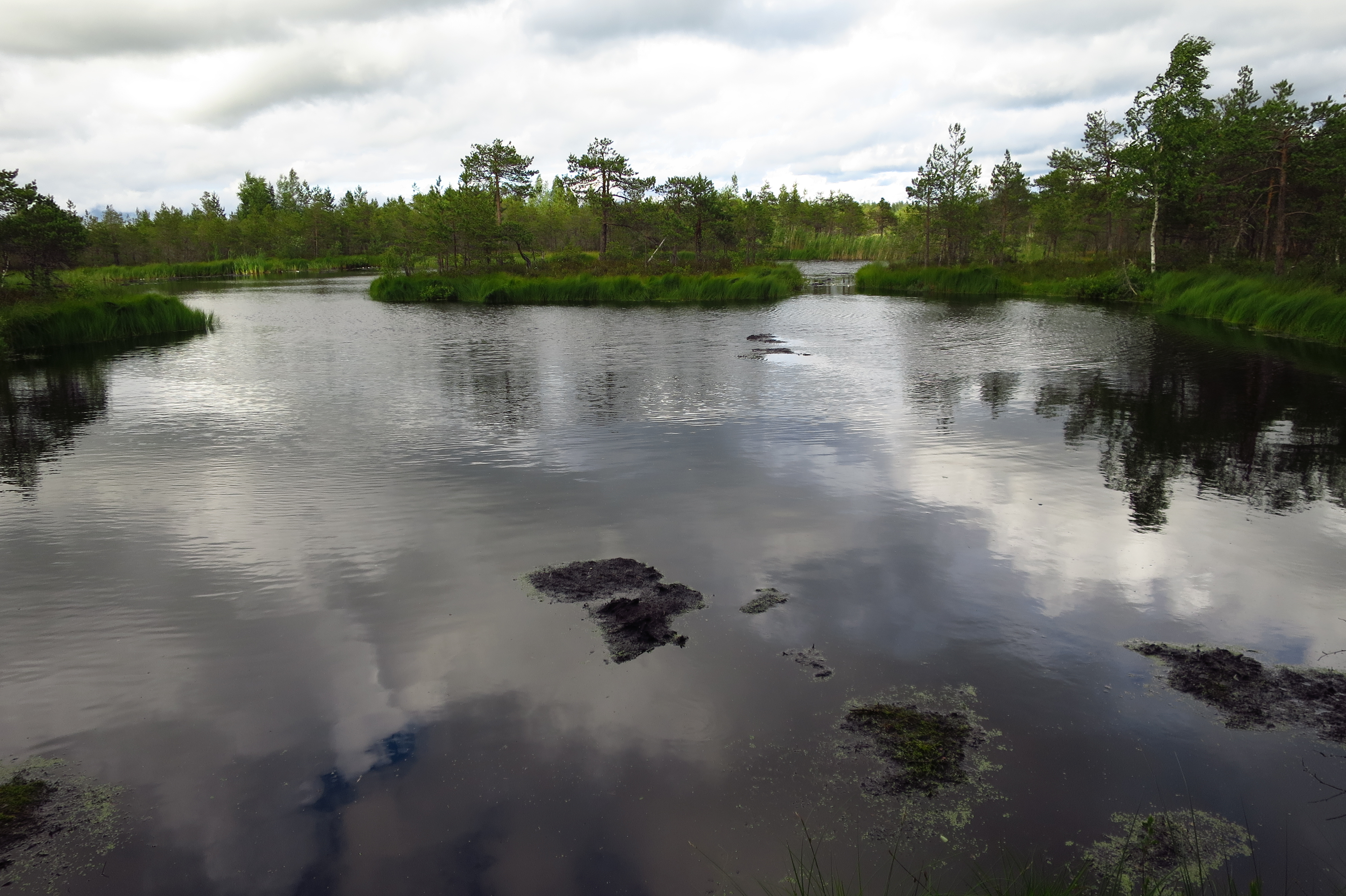 Laugas Sämi soos Sämi maastikukaitsealal